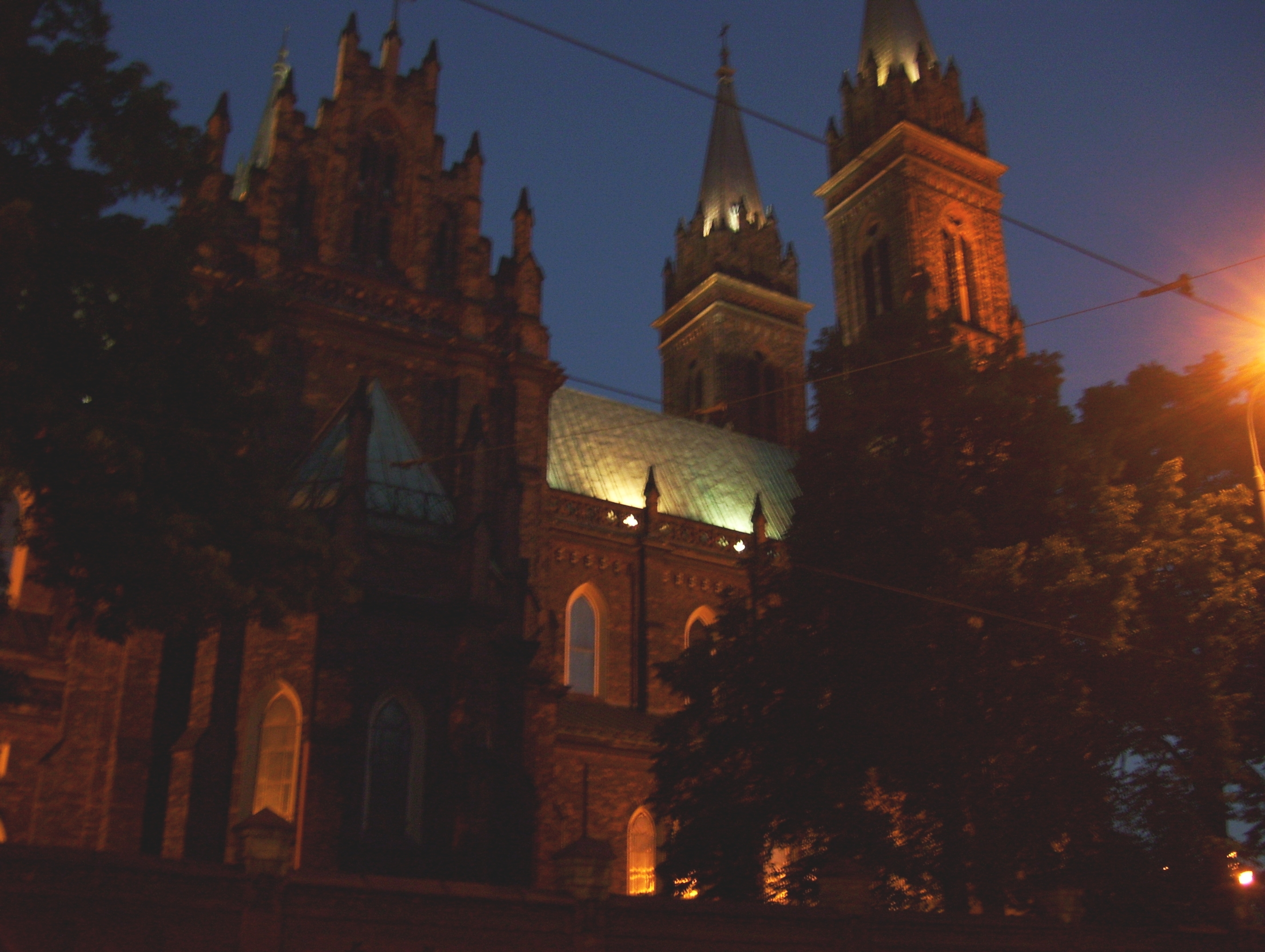 Kościół parafialny - wieczorny widok.